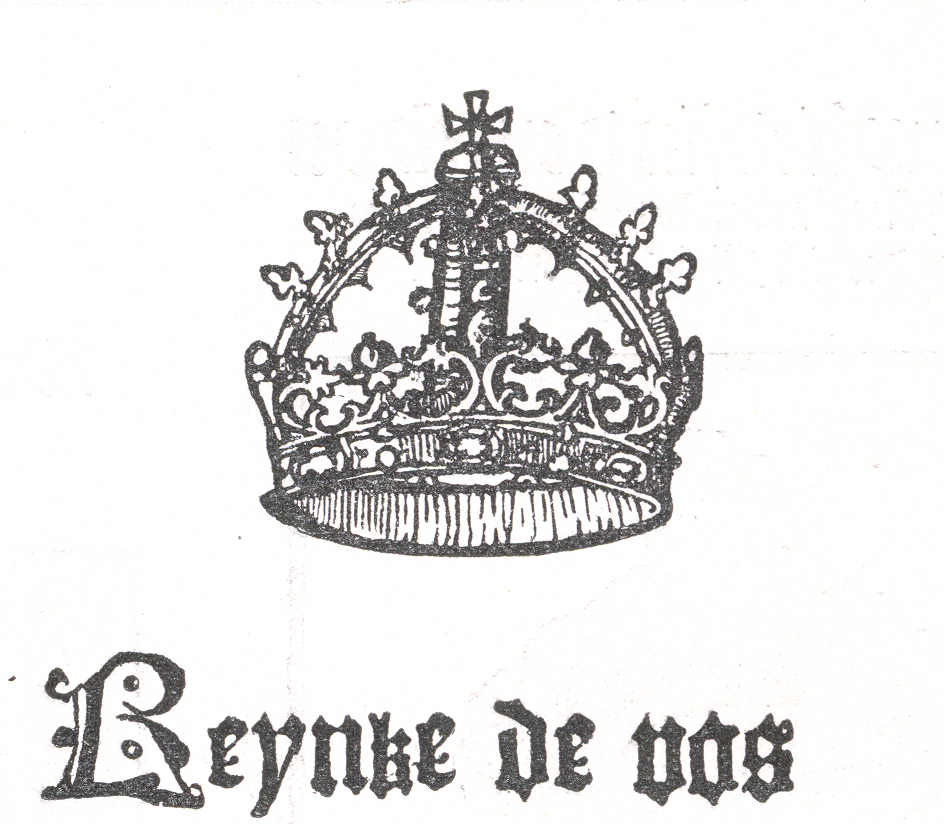 Reynke de vos: Titel der Inkunabel, gedruckt 1498 in Lübeck von Hans van Ghetelen